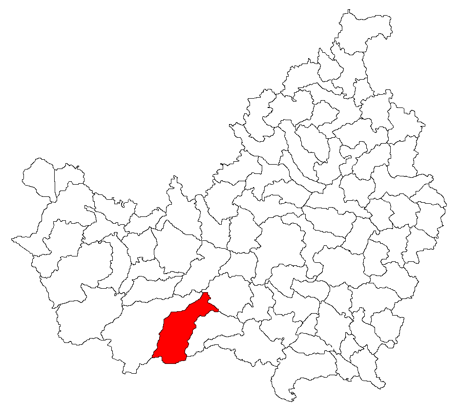 Comuna Valea Ierii, judeţul Cluj